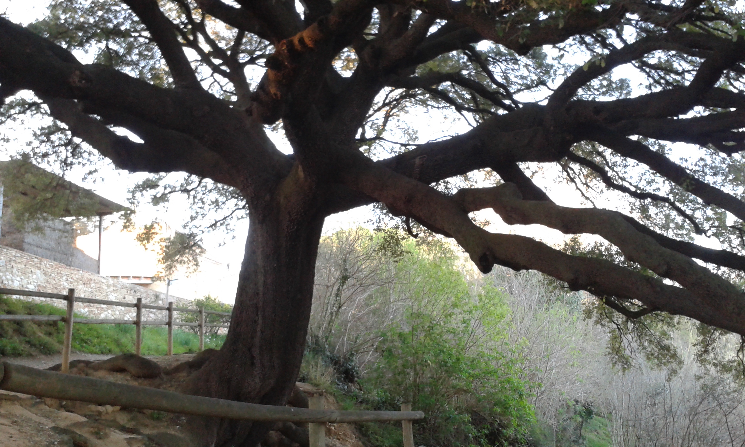 Alzina de la Font de Can Massanet, a Vilafant